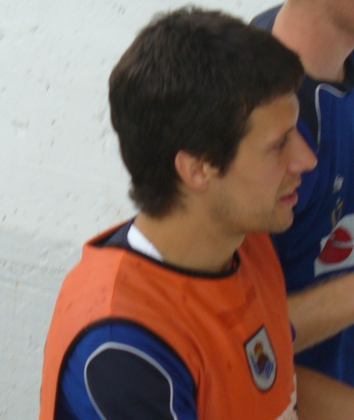 Mikel Aranburu en Zubieta